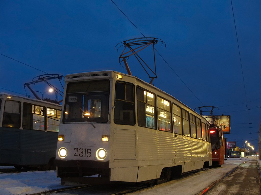 Трамвай 71-605А на ЖД Вокзале, Казань